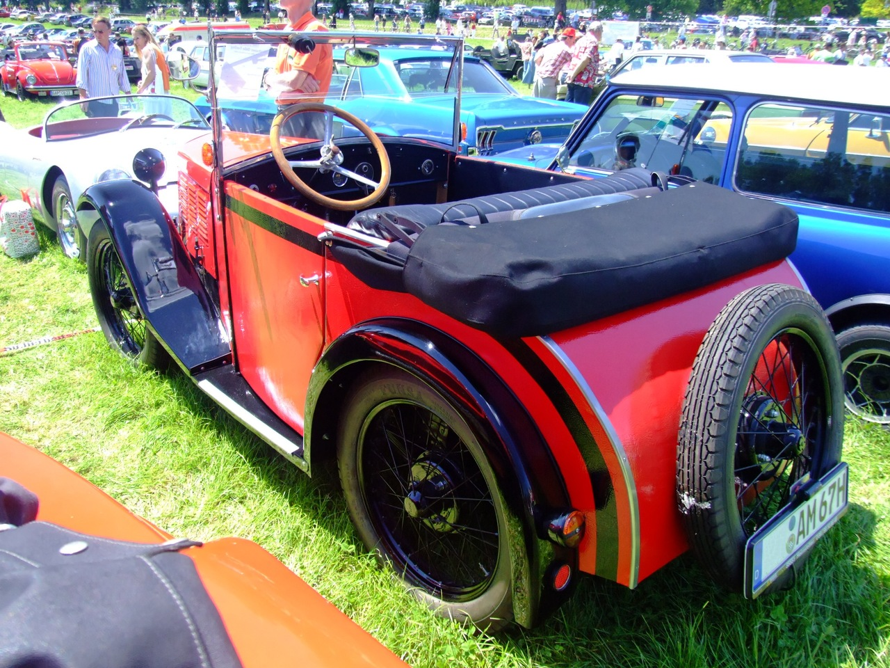 Quelle: selbst fotografiert, 06/2007 Fotograf: Späth Chr.